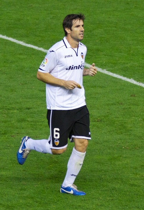 L'ex-capità merengot David Albelda